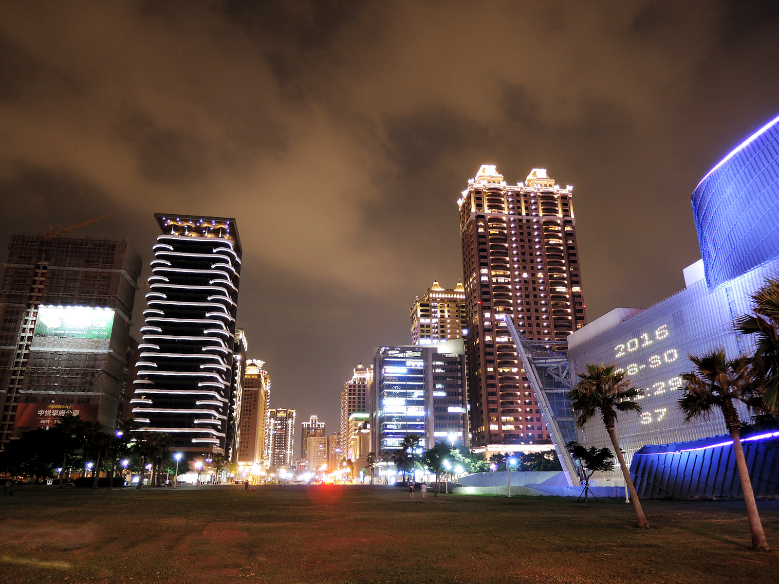 桃園市桃園區藝文特區